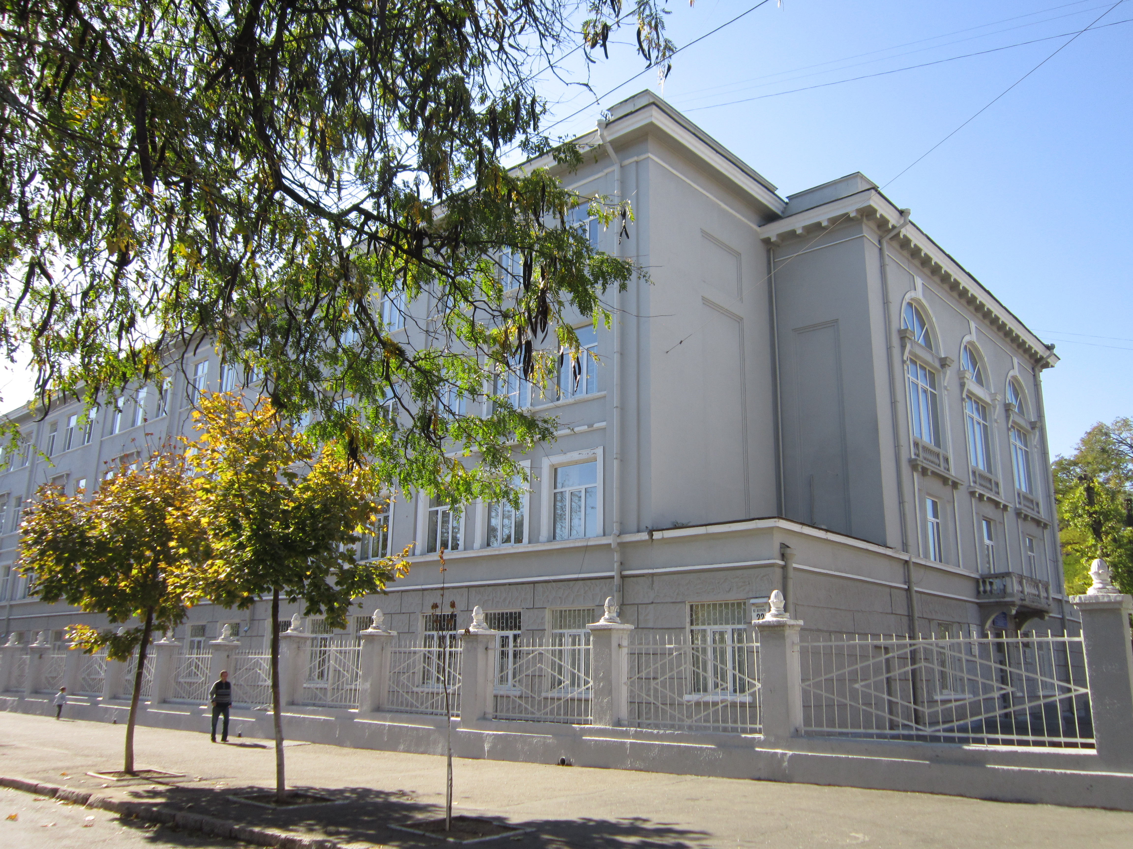 Будинок школи в якої: - навчався Добровольський Г.Т. - Герой Радянського Союзу, льотчик-космонавт - у 1940-1941 рр. знаходилась Одеська воєнно-морська спец. школа № 6., Одеса, Десятого квітня вул., 22